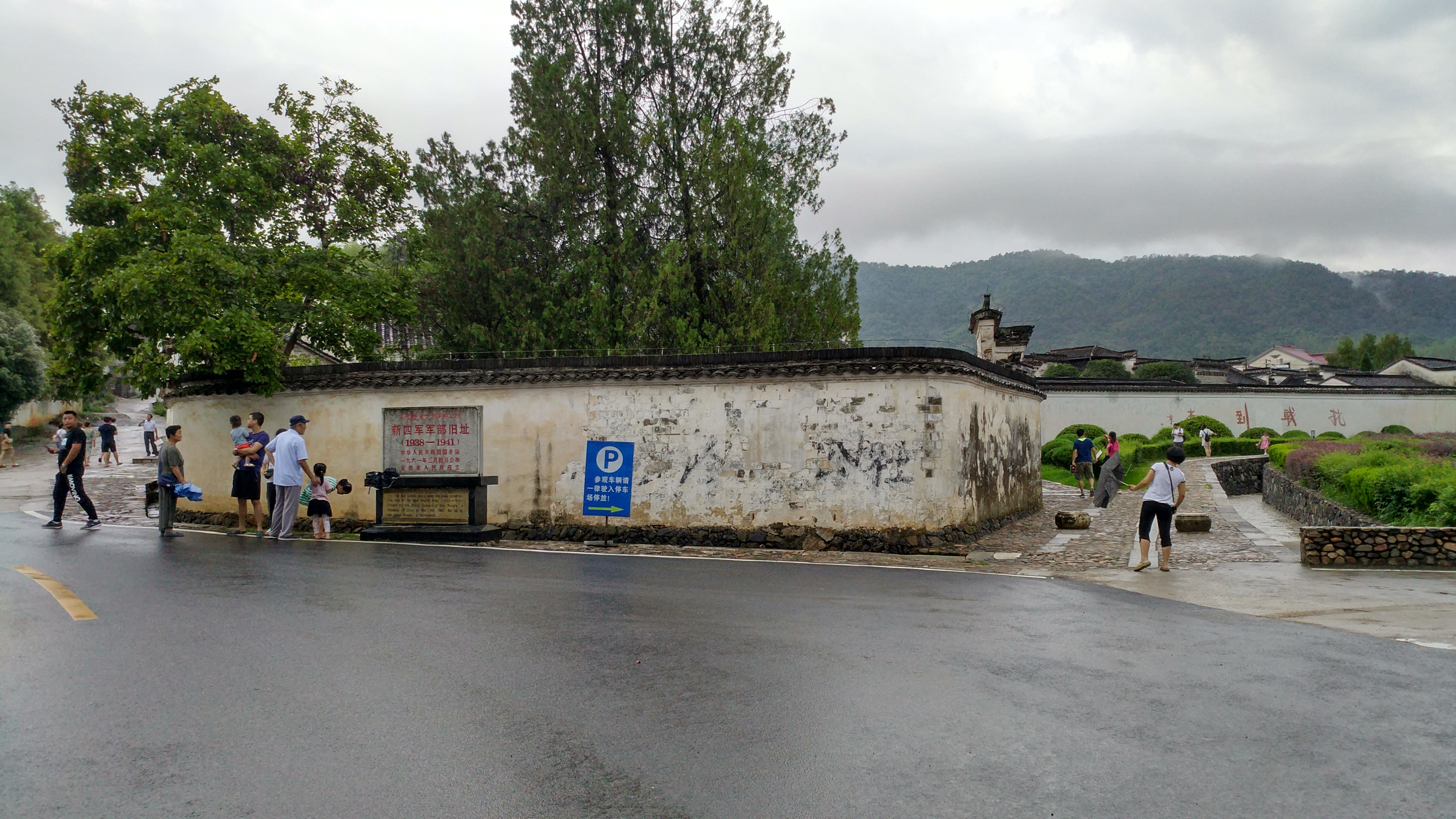 泾县新四军军部旧址——司令部旧址（种墨园）